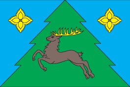 Прапор Сторожинецького району